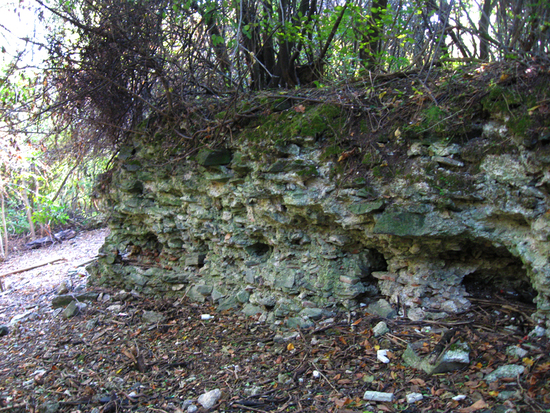 Рушевине Јулич града,са сајта